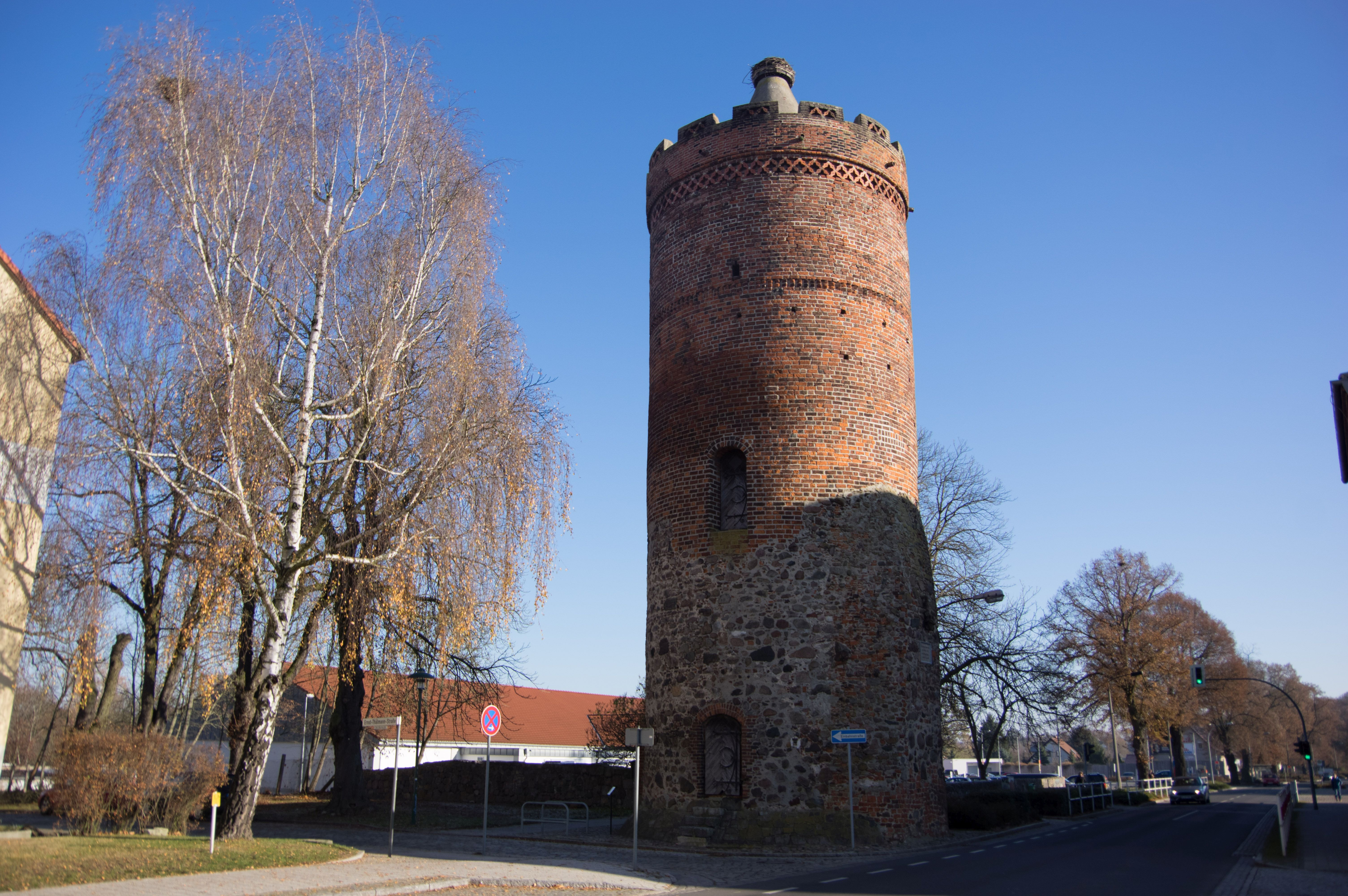 Müncheberg in Brandenburg. Die Stadtmauer ist denkmalgeschützt.